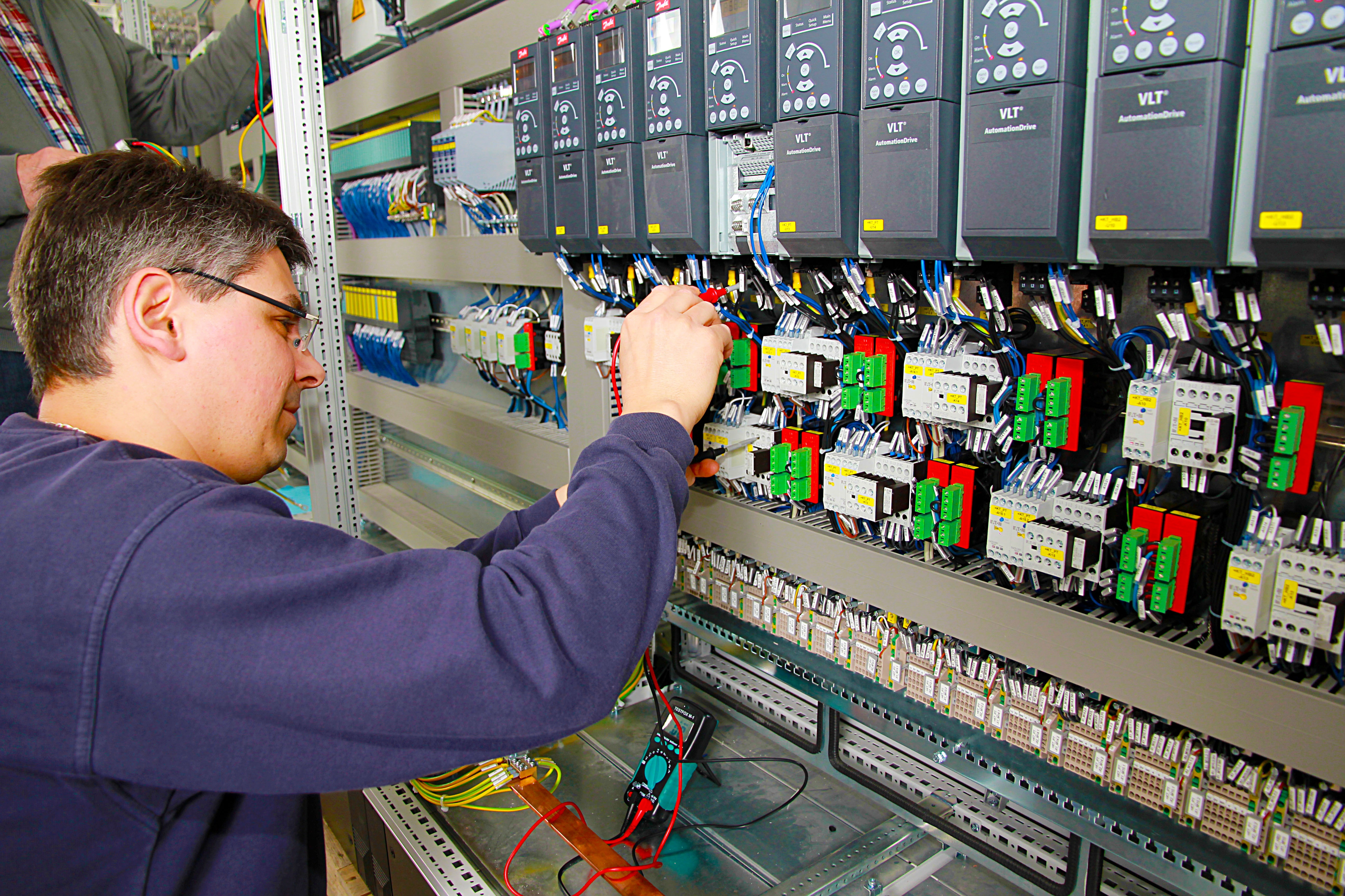 Automação e acionamentos elétricos industriais